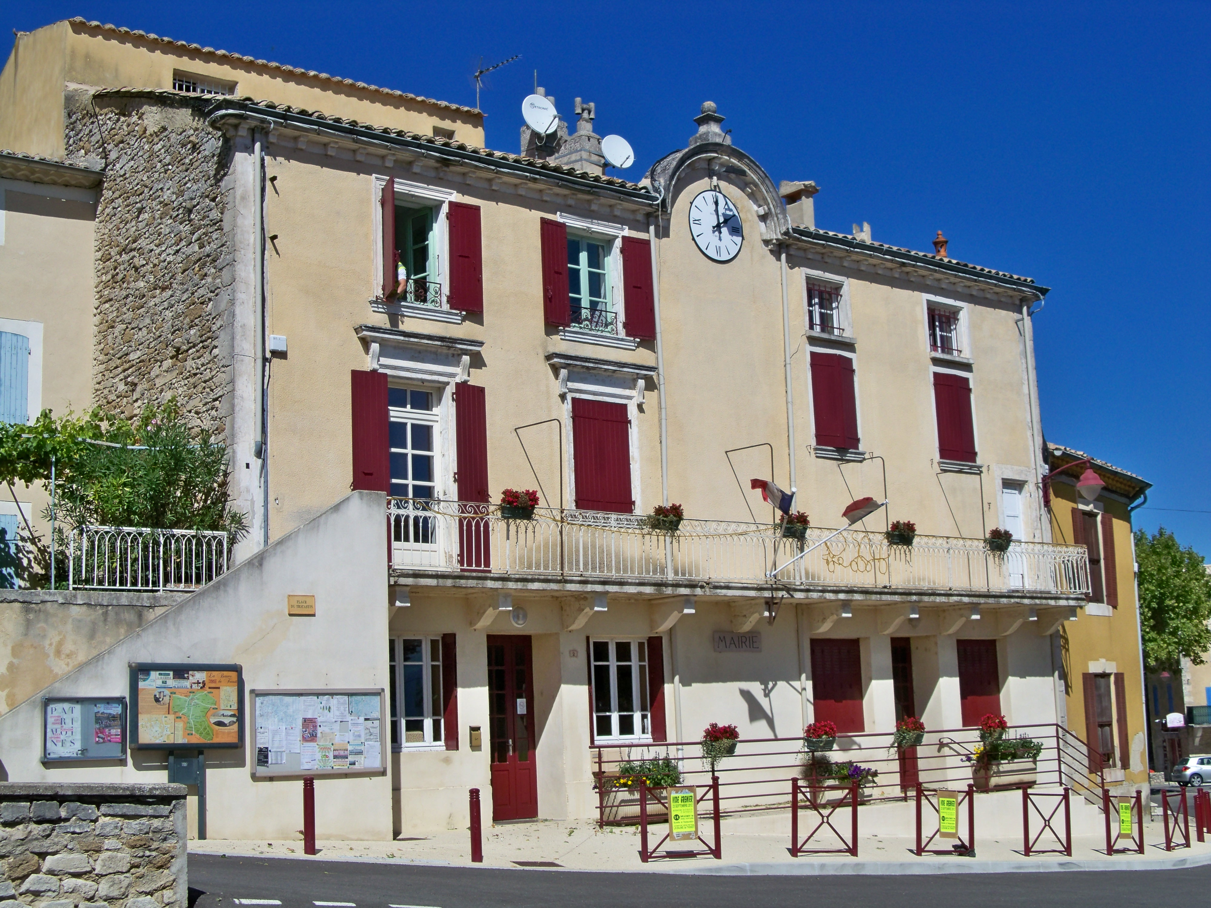 Mairie de la Beaume de Transit